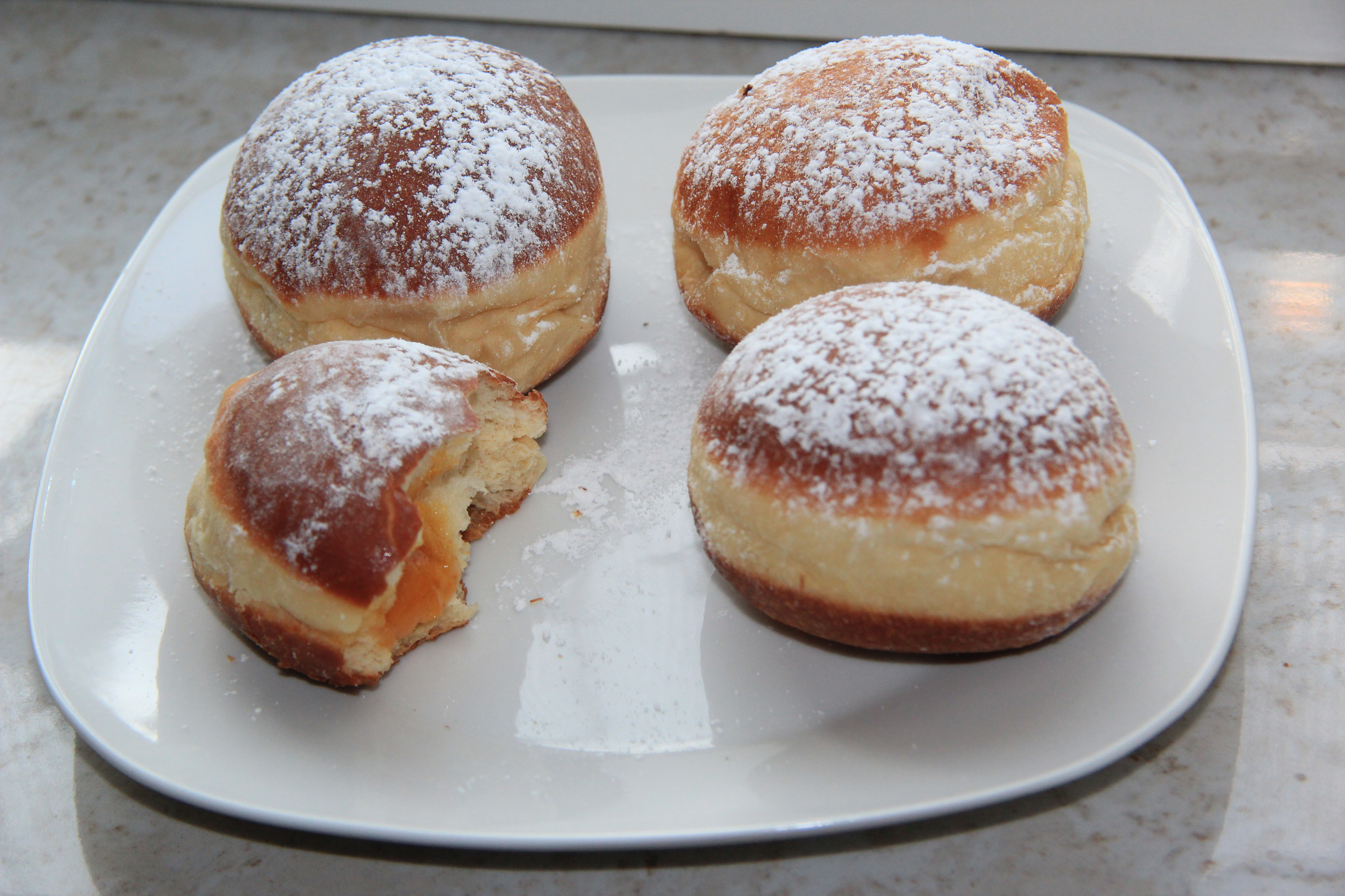 Wiener Faschingskrapfen mit Marillenmarmelade